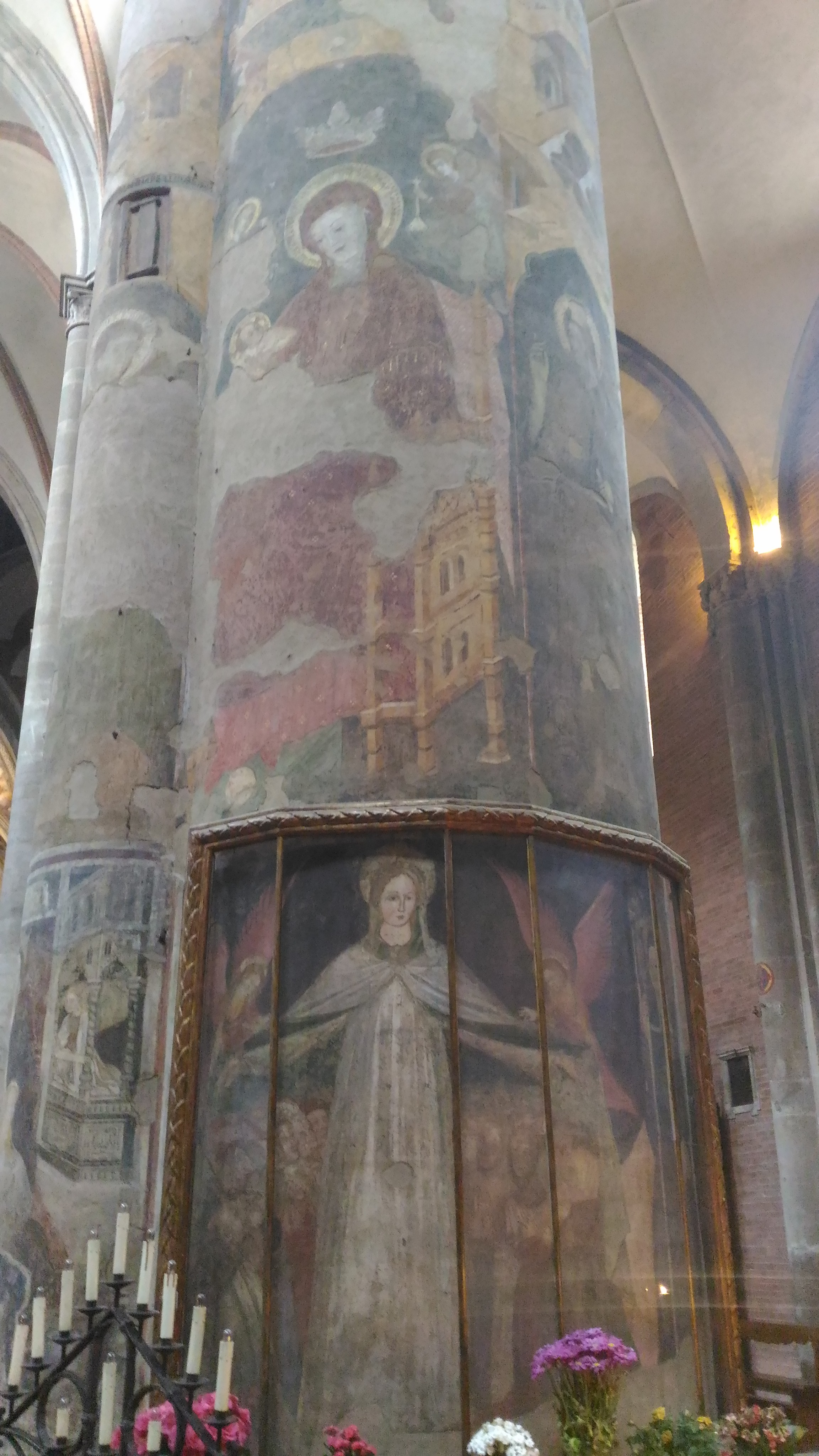 Duomo di Piacenza